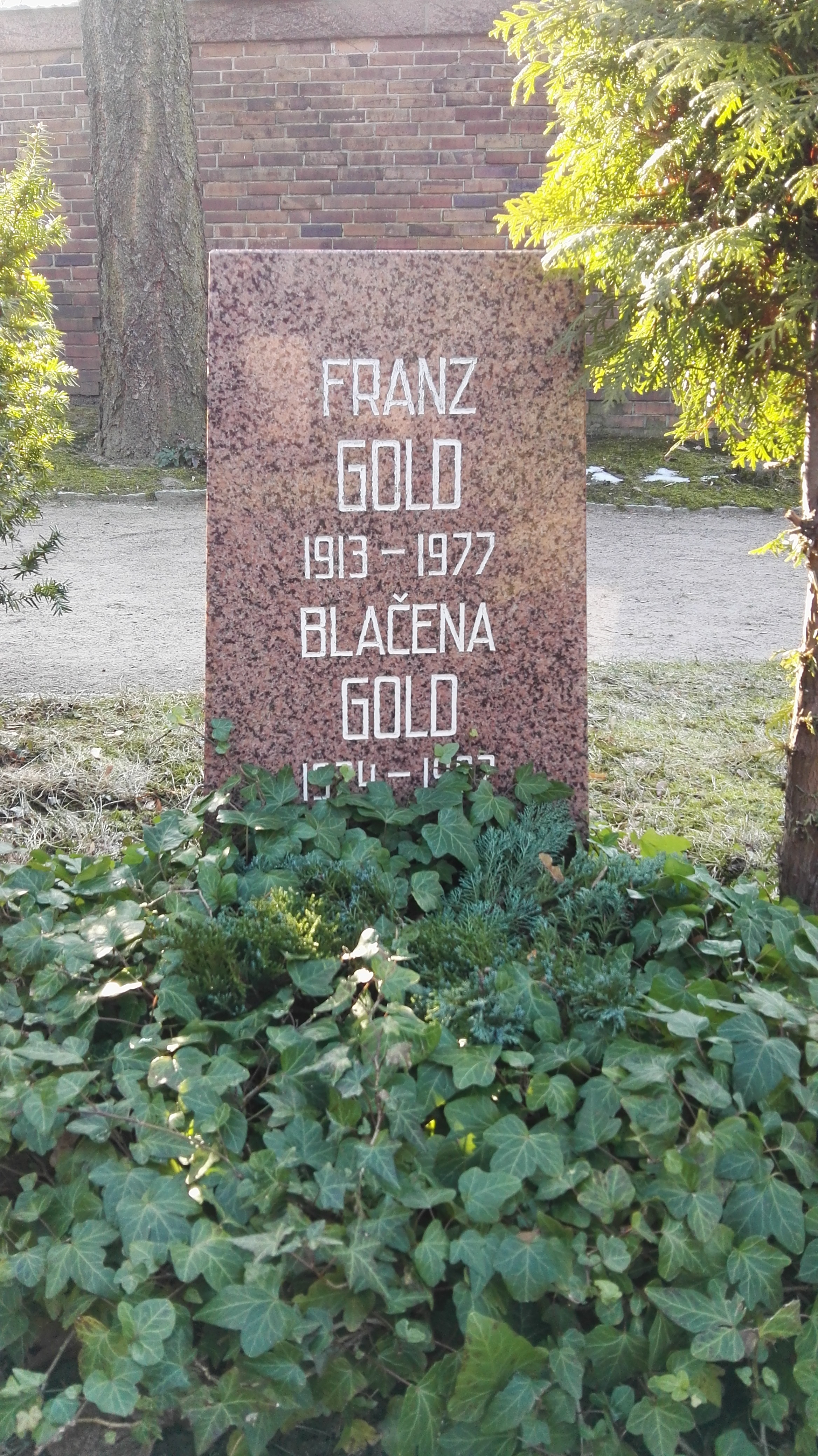 Grab von Franz Gold und Blacena Gold in der Grabanlage Pergolenweg auf dem Sozialistenfriedhof des Zentralfriedhofs Friedrichsfelde